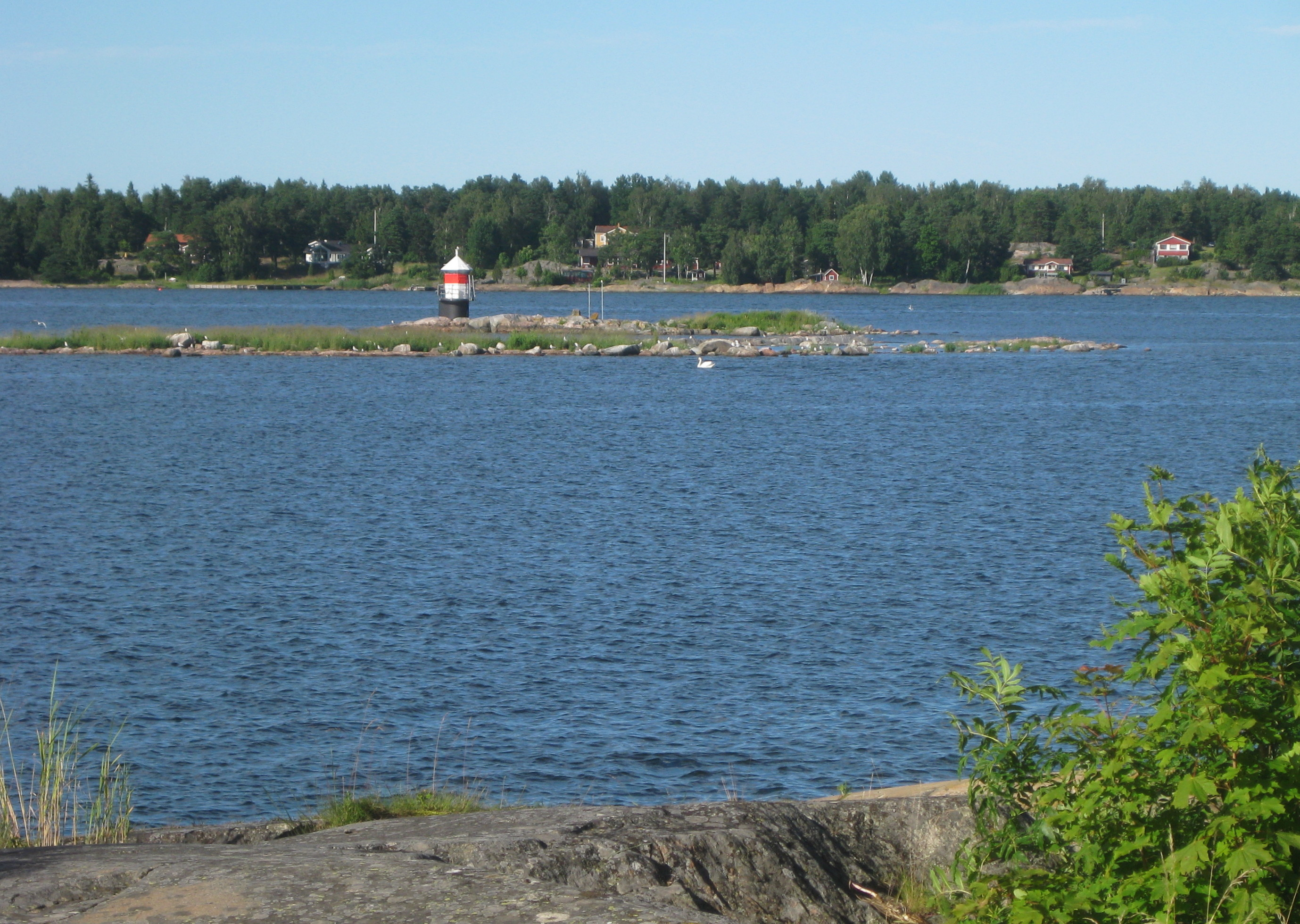 Dummelgrundets fyr i mellan Öregrund och Gräsö